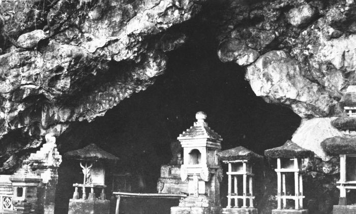 Foto. Offeraltaren bij de Pura Goa Lawa of Vleermuizengrot bij Koesamba